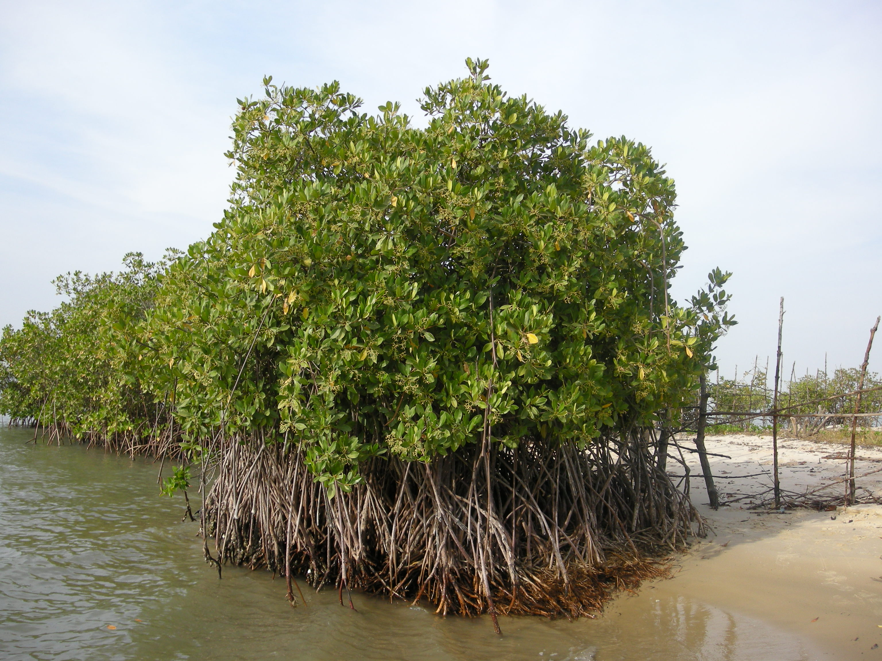 Mangrove à palétuviers sur l'île de Carabane (Casamance, Sénégal)